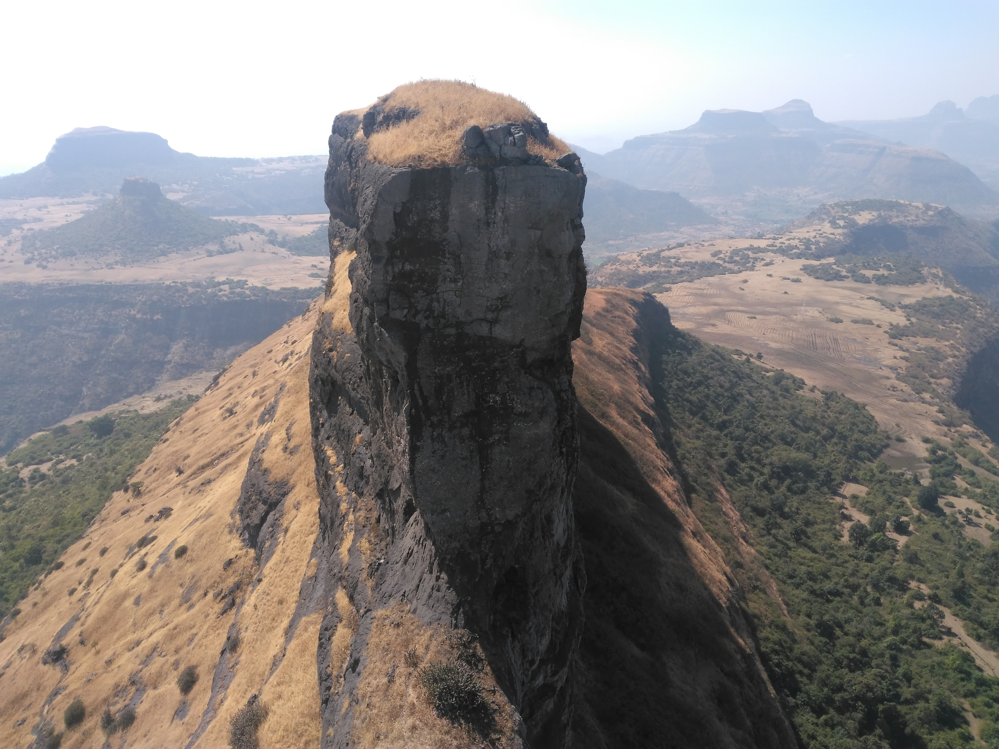 धोडप खाच दृश्य